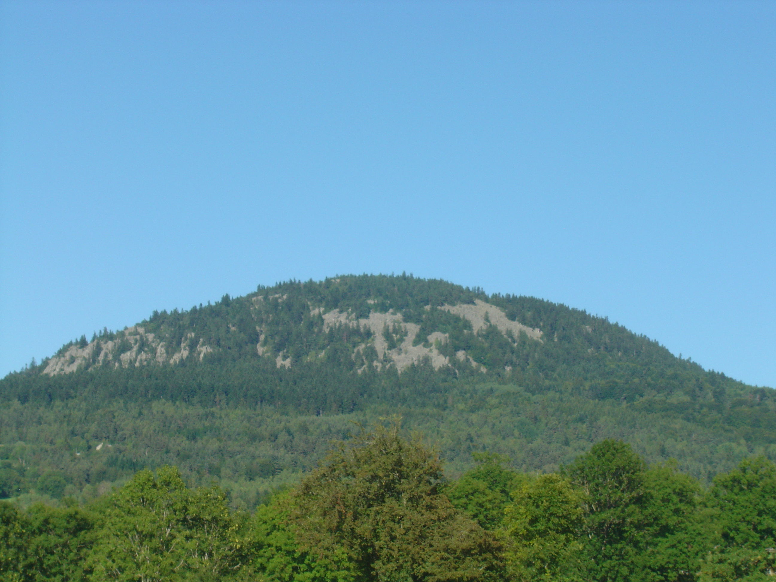 Suc du Meygal